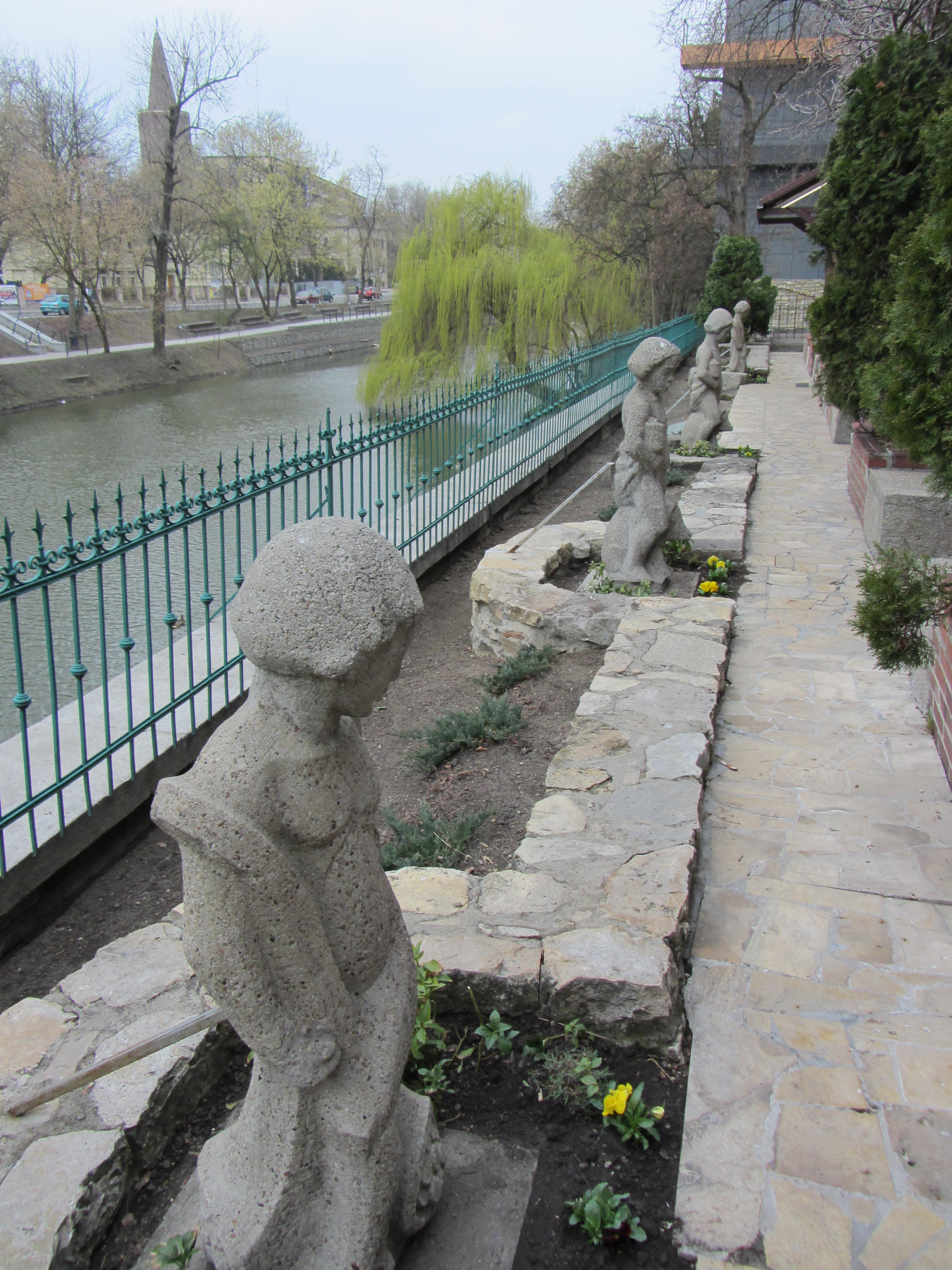 Kinderskulptur